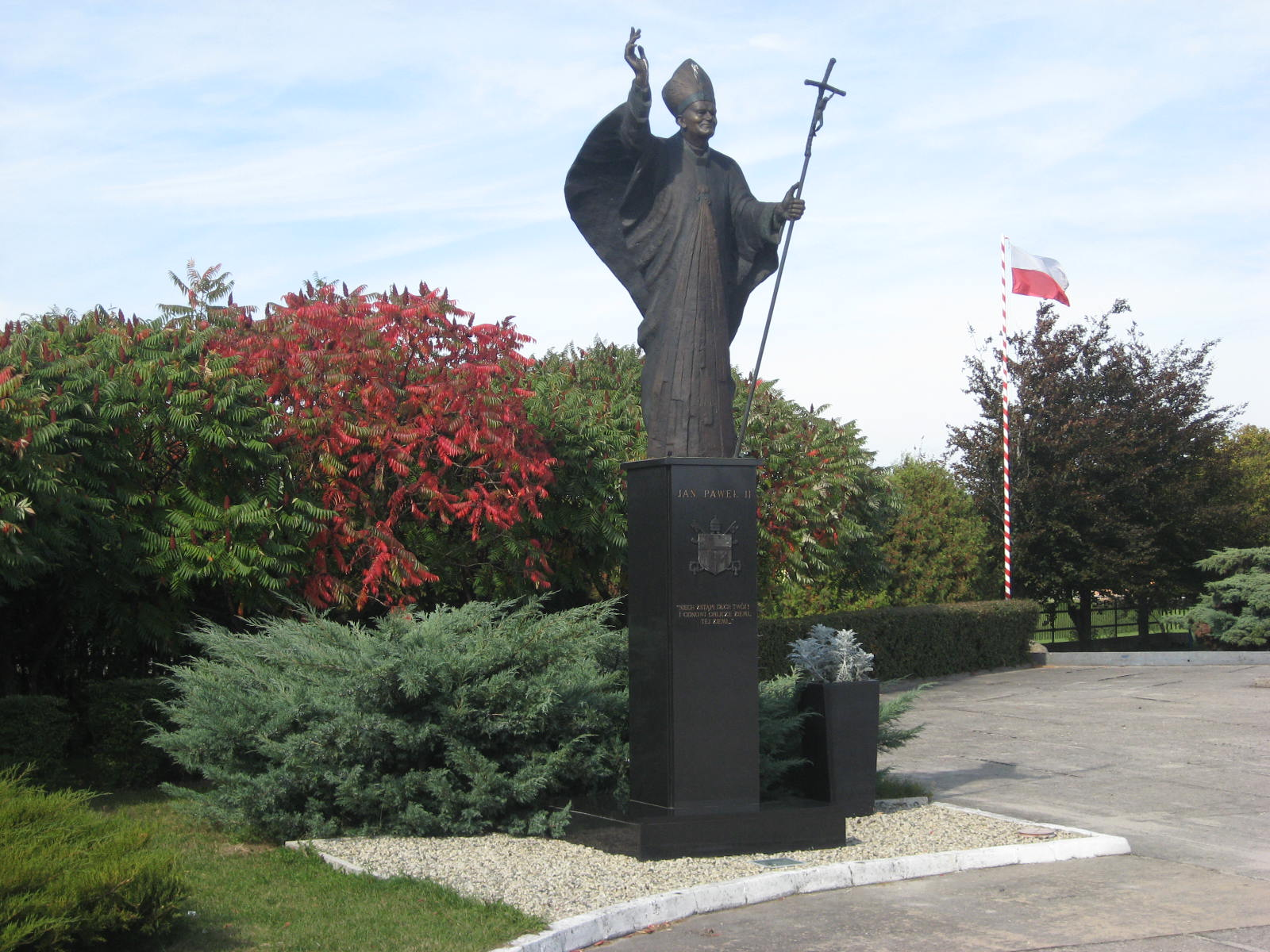 bł.Jan Paweł II